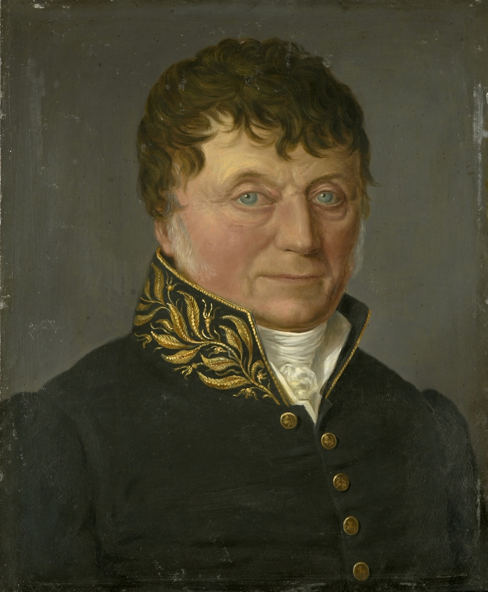 Brystbilde. 1/4 høyre profil. Hår brunt. Whiskers grå. Ansikt rødmusset. Øyne lys grønnblå. Gråhvit fadermorder og halsbind. Svart uniformsfrakk med messingknapper med den norske løve. Høy krage brodert med blomsterranker i gulbrunt. Bakgrunn blågrå.